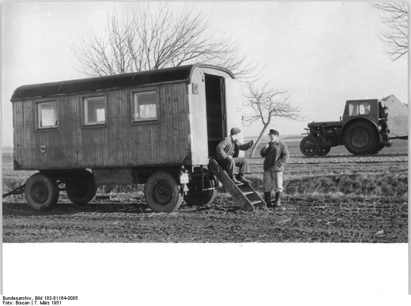 Schwaneberg, Wohwagen des VEG Zentralbild Biscan 7.351 Frühjahrsbestellungen in der Magdeburger Börde Das Volkgut Schwaneberg Altweddingen , Kreis Wanzleben , hat sogenannte Leutewagen eingesetzt , um die Landarbeiter aufs Feld zu bringen und ihnen bei Schlechtwetter eine Unterstellmöglichkeit zu bieten . Die Landarbeiter schützen die Neueinführung ausserordentlich und möchten sie nicht mehr missen.